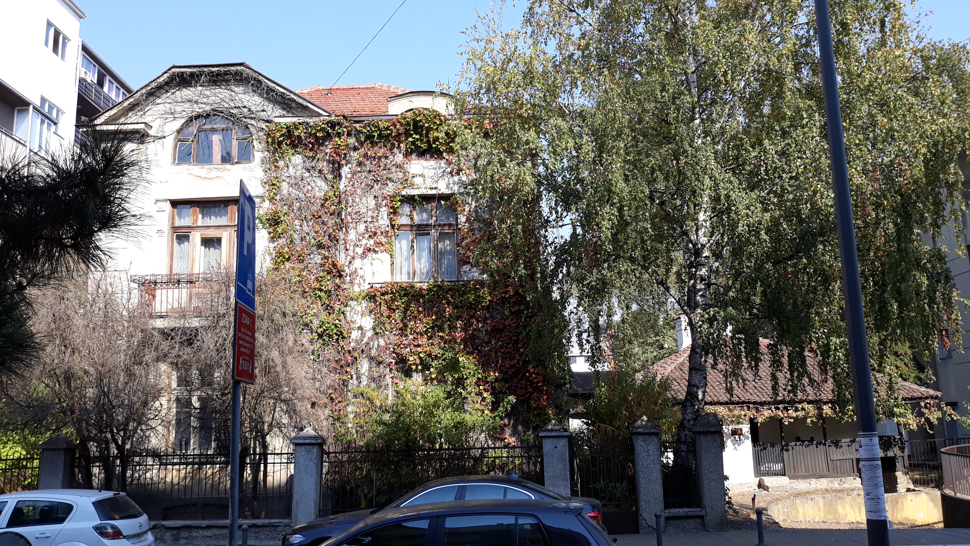 Новаковића кућа у Краљеву налази се у Улици Цара Душана, на броју 37.